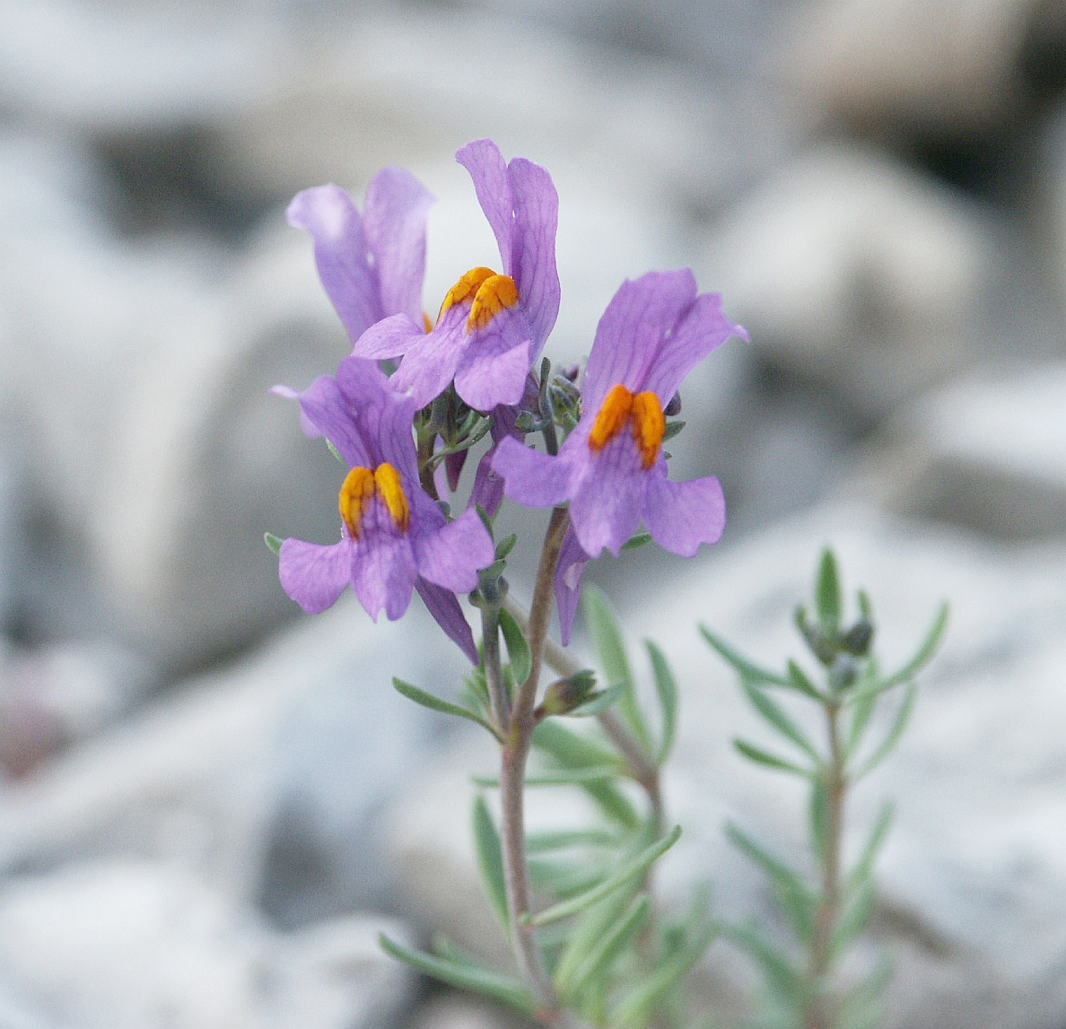 Linaria alpina